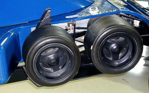 Tyrrell Project 34 mit Vierradlenkung Baujahr 1976 im Technik-Museum Sinsheim